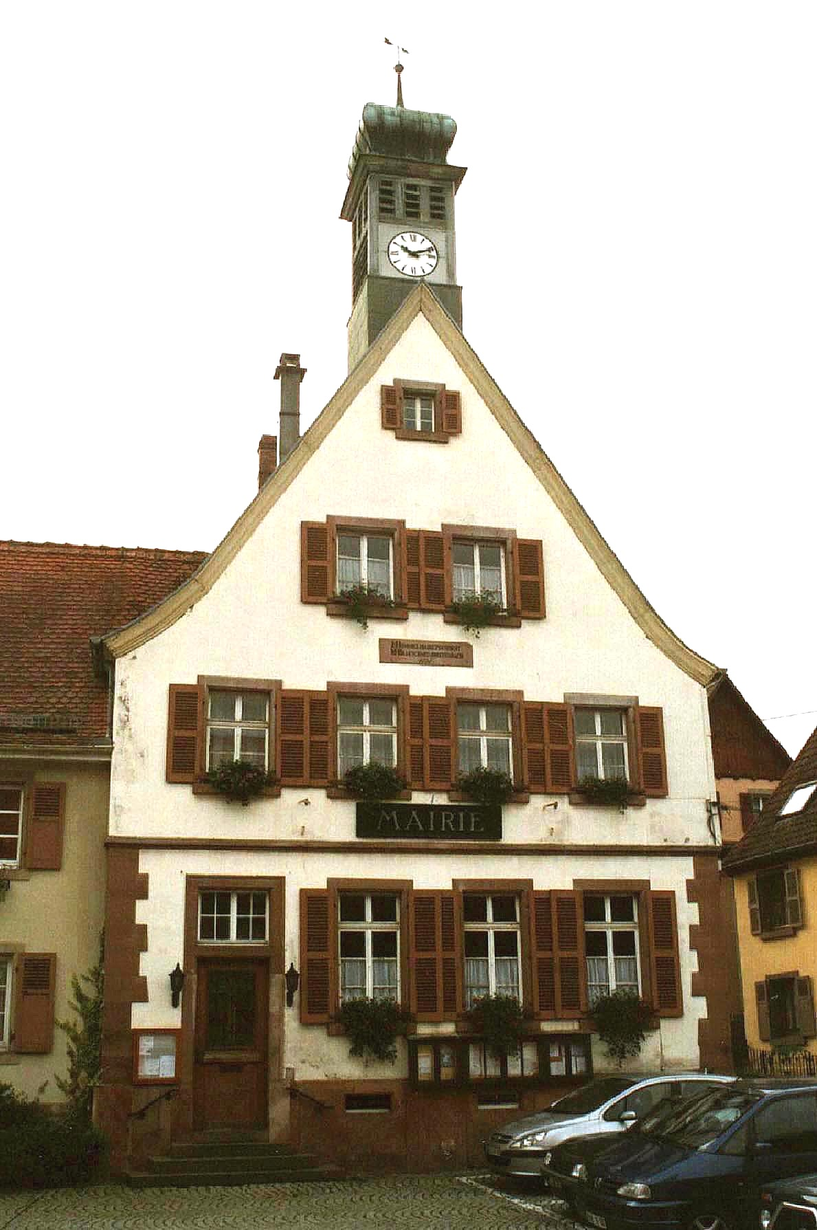 Mairie de Breitenbach-Haut-Rhin. .